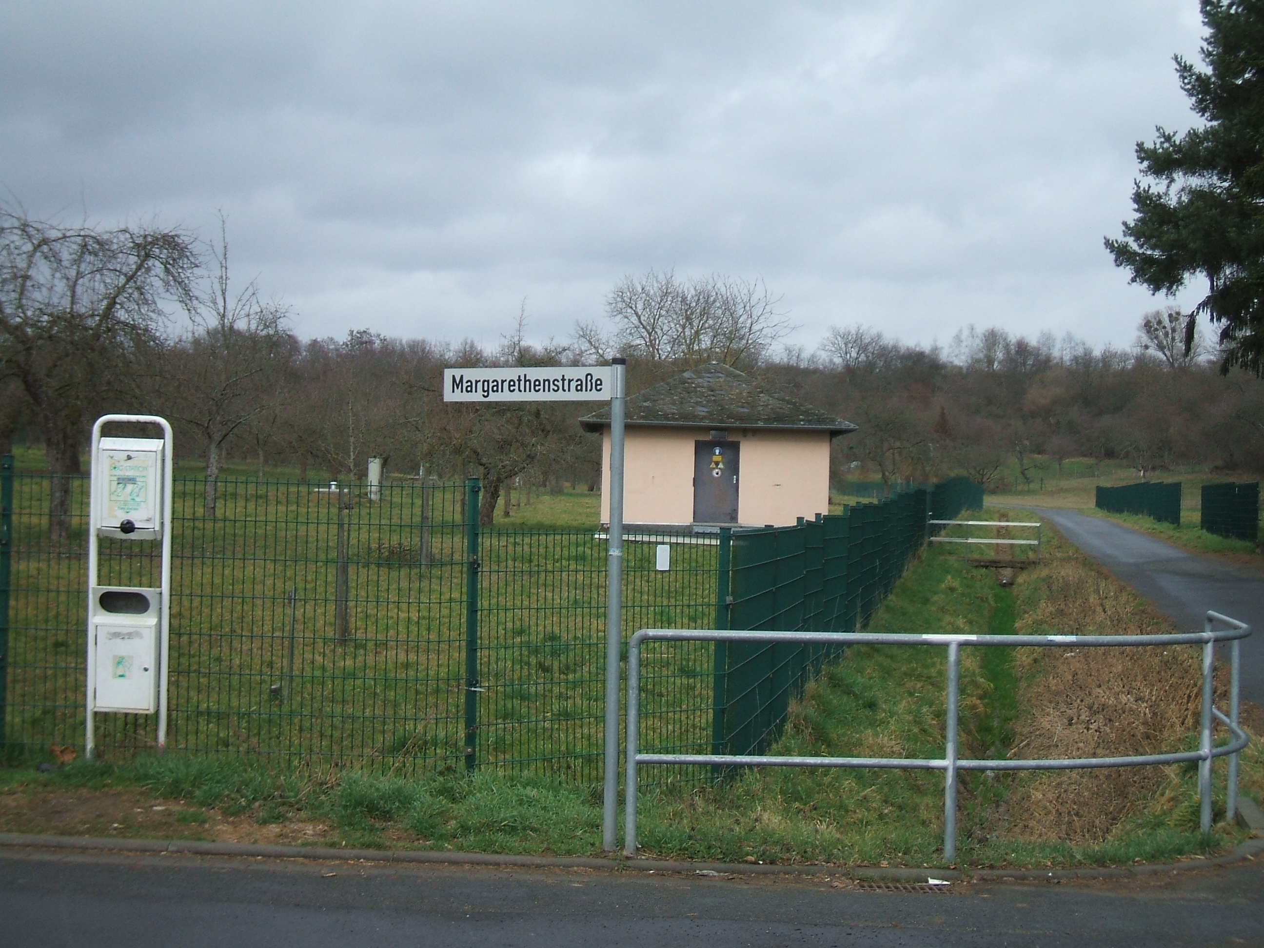 Bad Nauheims einzige Trinkwassergewinnungsanlage Säckelgraben, gelegen in Nieder-Mörlen an der Margarethenstraße